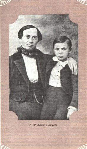 Анатолий Фёдорович Кони с отцом Фёдором Алексеевичем Кони.